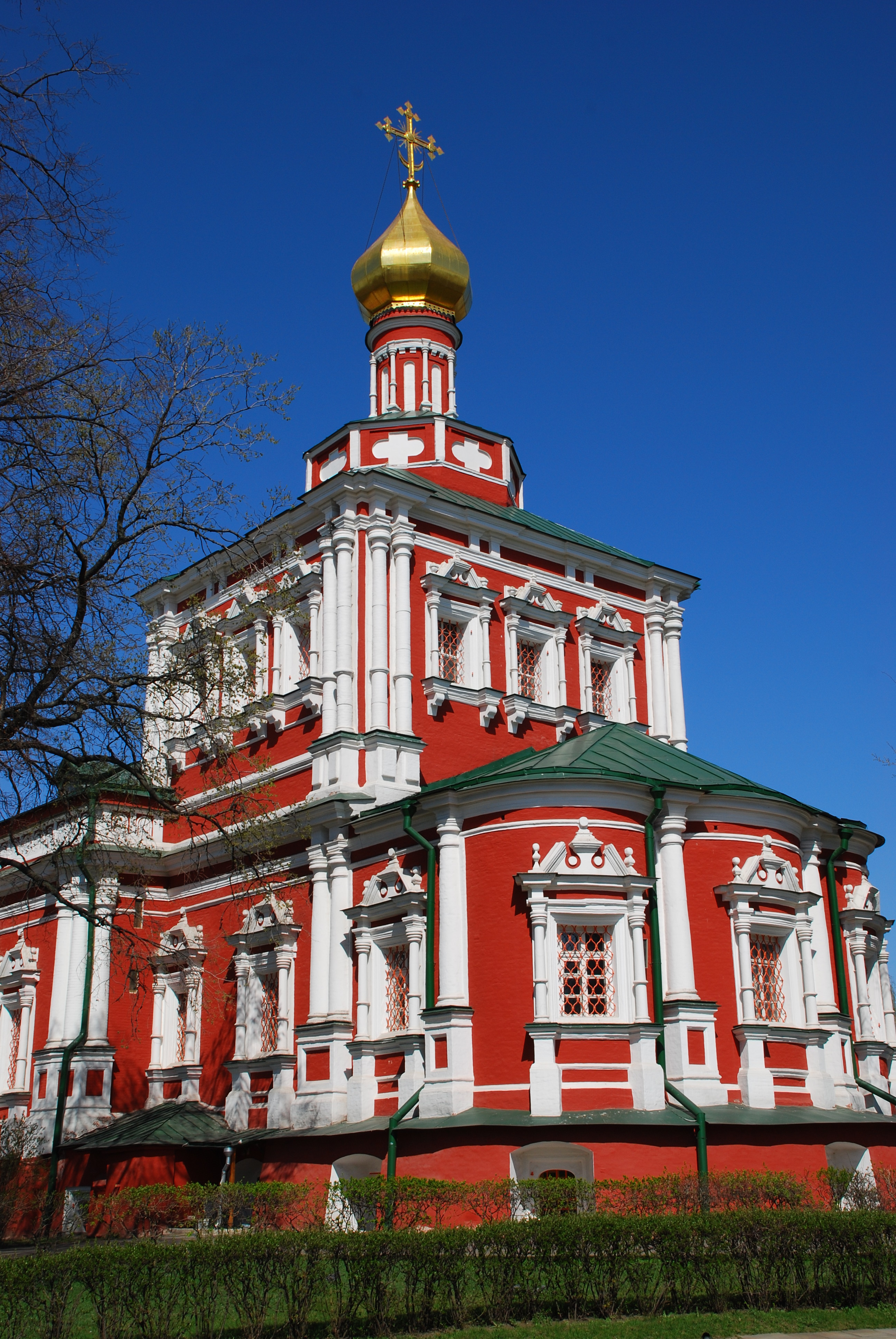 Трапезная палата с храмом Успения Пресвятой Богородицы 1682-1687 гг.